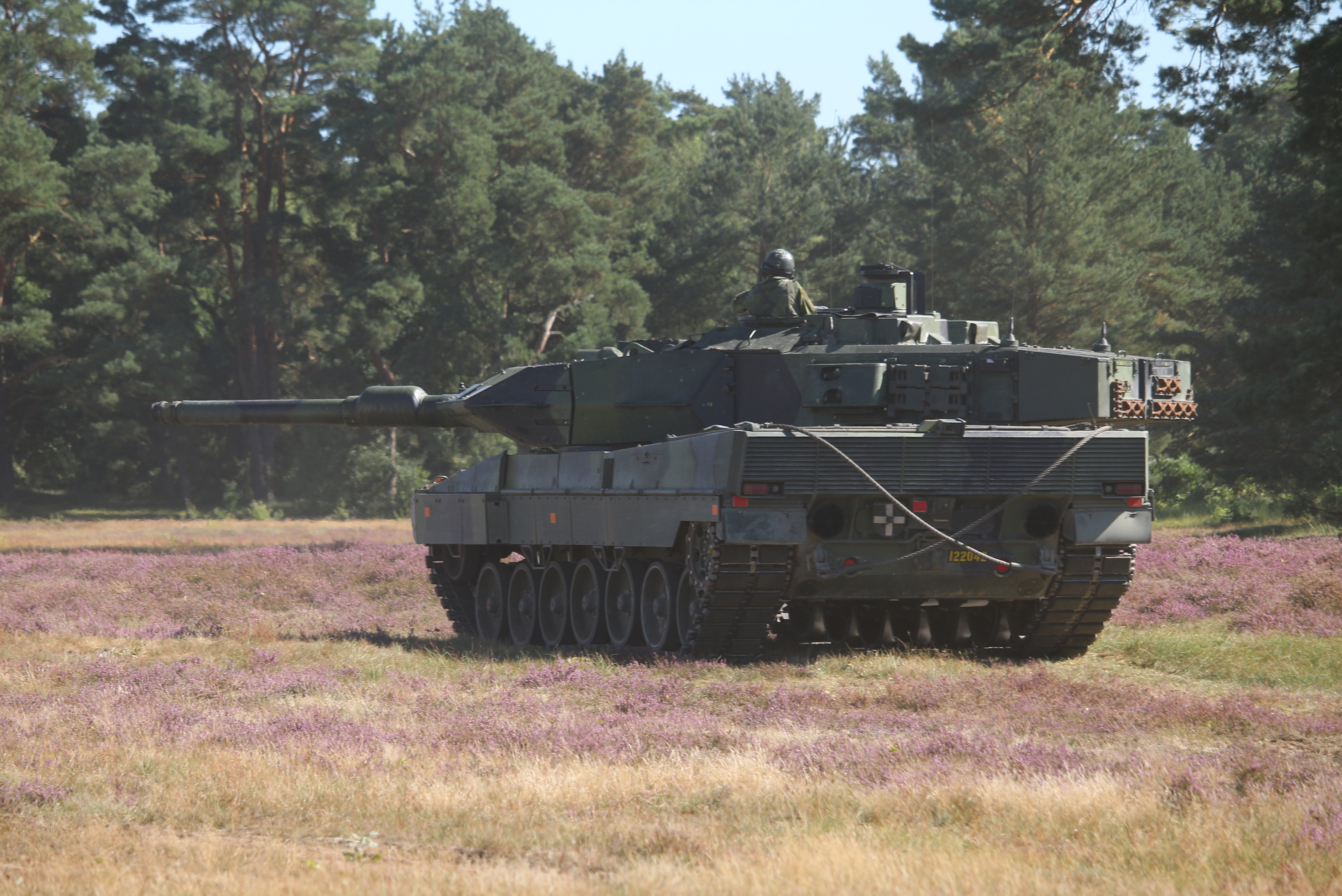 Stridsvagn 122 Revinge 2016